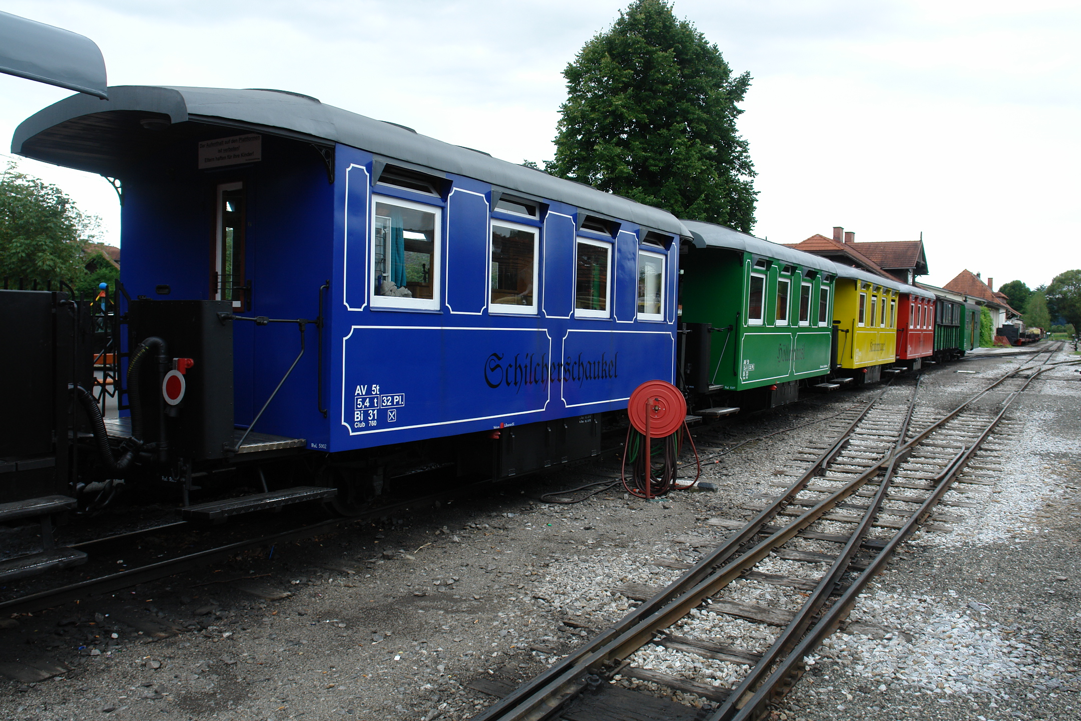 Stainzer Lokalbahn (Stainzer Flascherlzug)